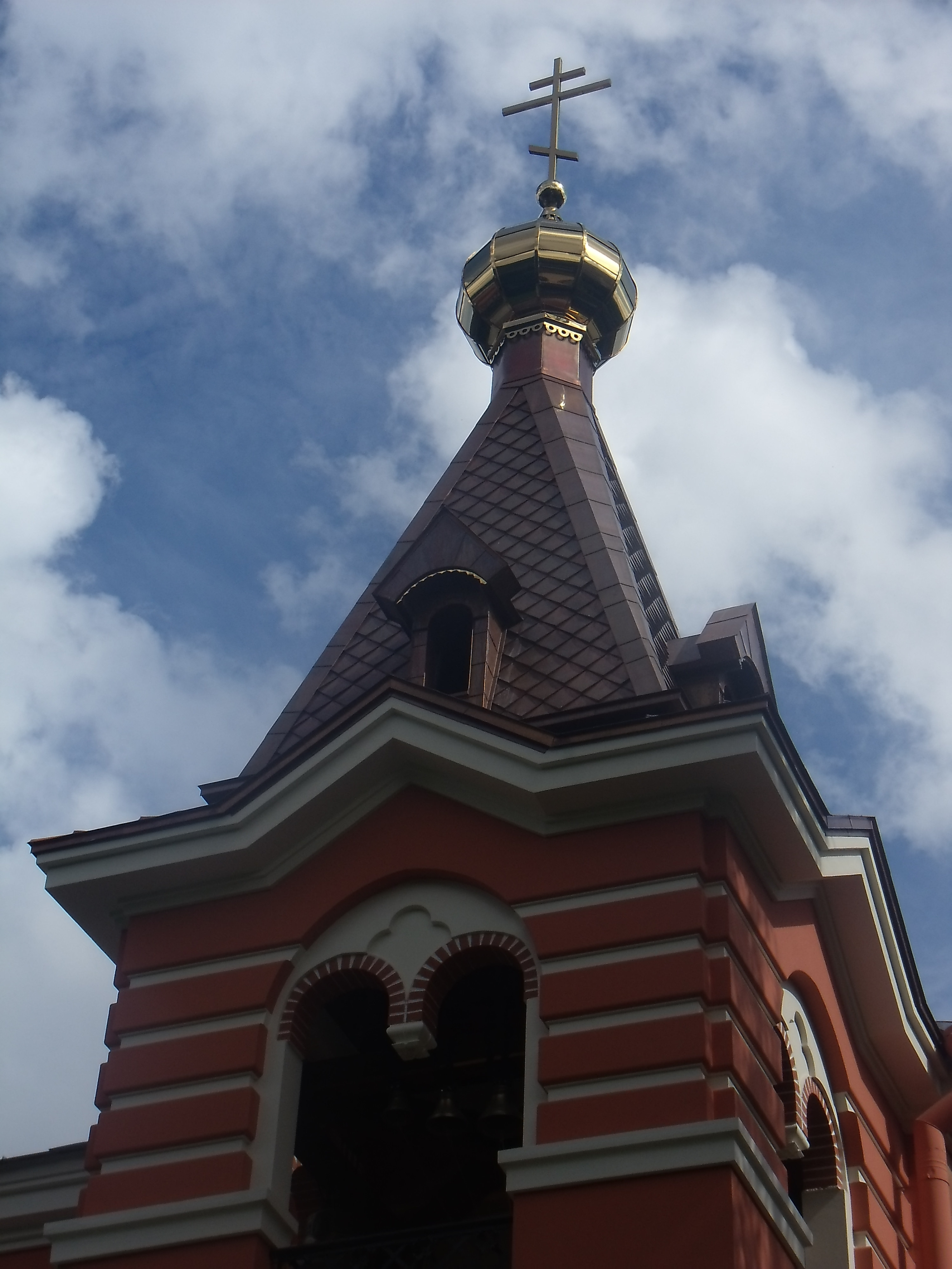 Колокольня храма Преображения Господня в Лесном (Санкт-Петербург, ул. Орбели, д.25), август 2012